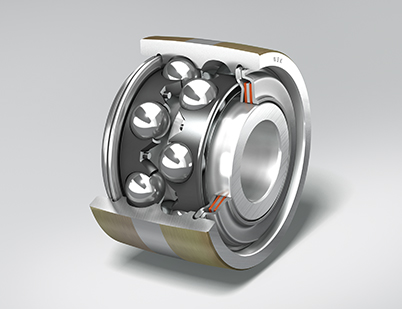 Roller cut Bearing